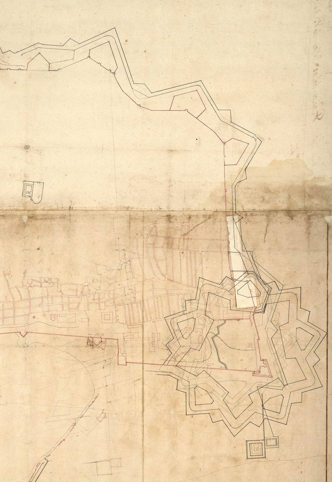 Originales de los planos de las calles de Barcelona y el primer proyecto de la ciudadela. Material cartográfico AGS. Secretaría de Guerra, Legajos, 03649, 14. Conservado con los tres planos siguientes: 08/148, 149, 150, en una carta del Conde de Lecheraine a D. Miguel Fernández Durán. Barcelona, 29 de marzo de 1715.